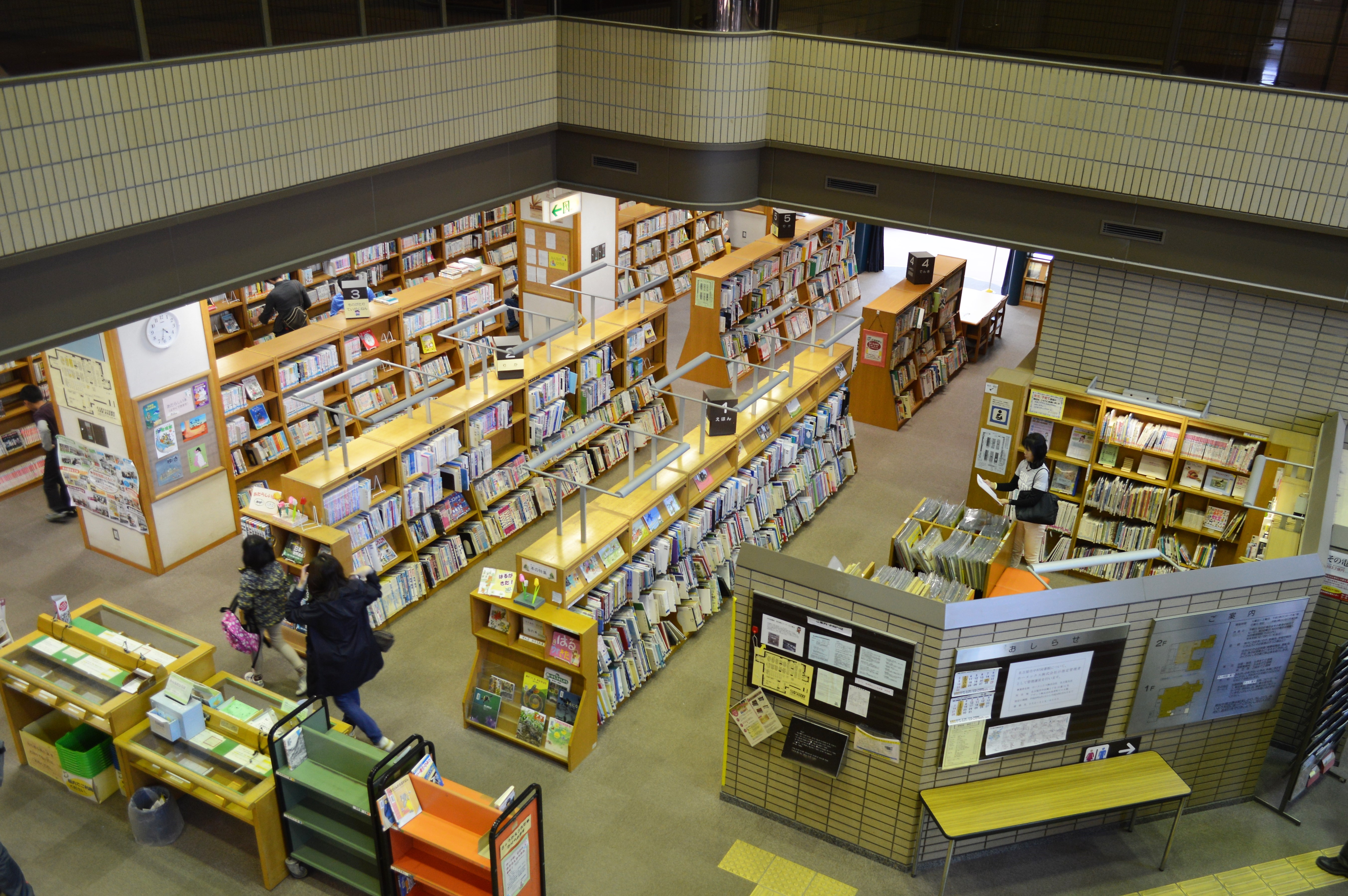 名古屋市中村図書館。2階から1階の図書館部分をみる。